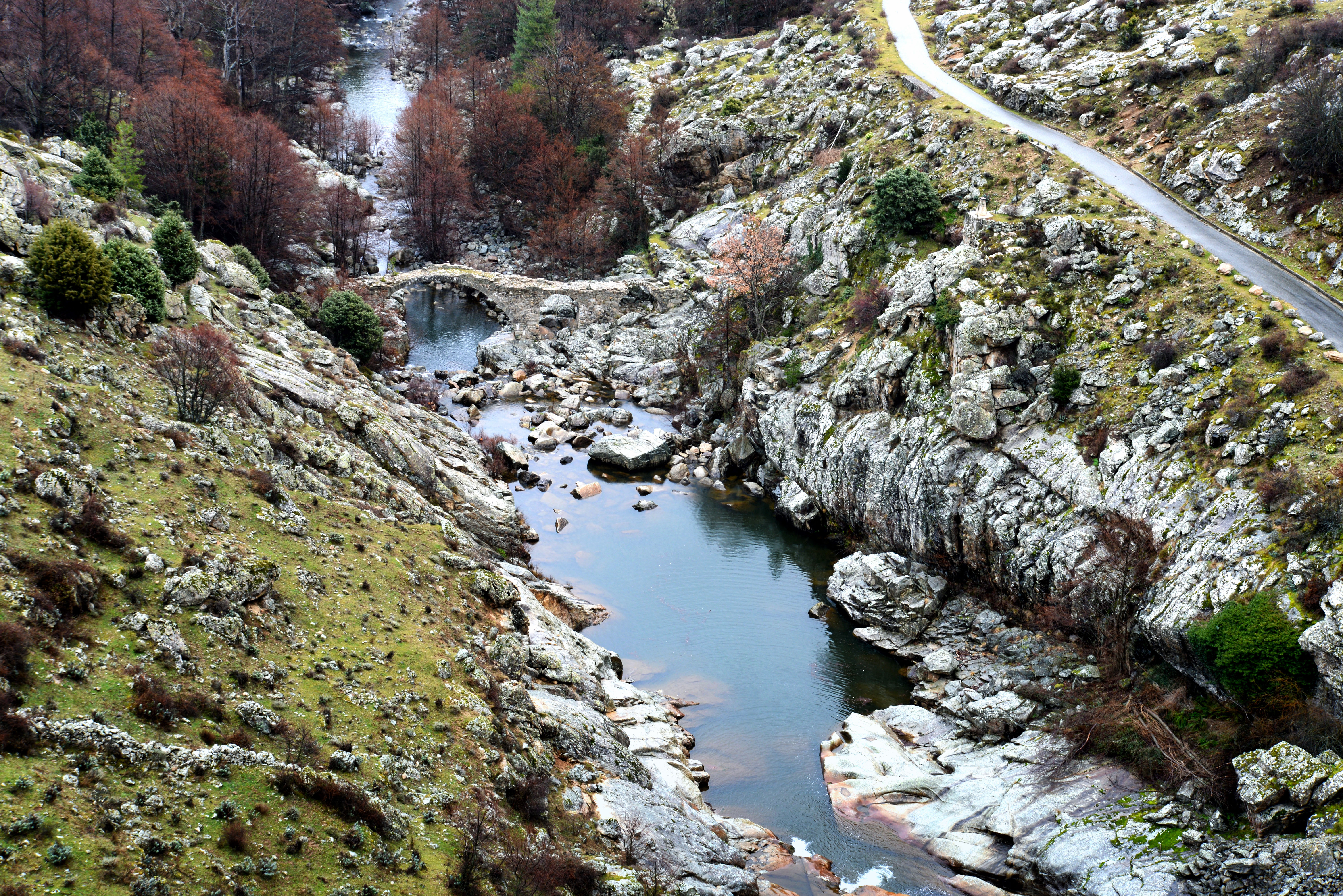 Calacuccia, Niolo (Corse) - Pont génois ruiné de Fontanella, situé sous le barrage